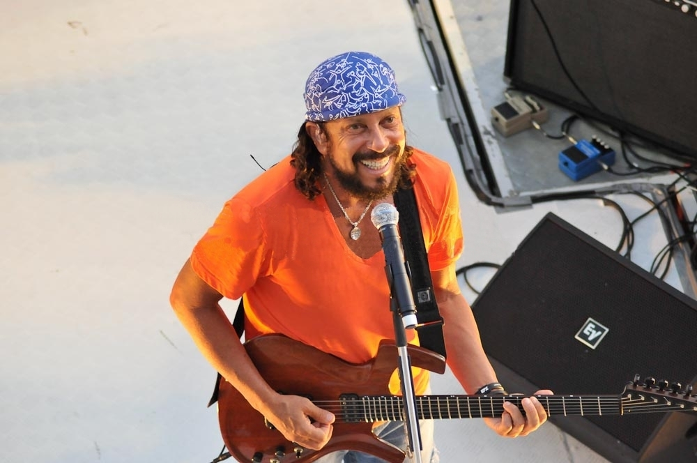 Bell Marques no Carnaval 2010 no camarote oceania.